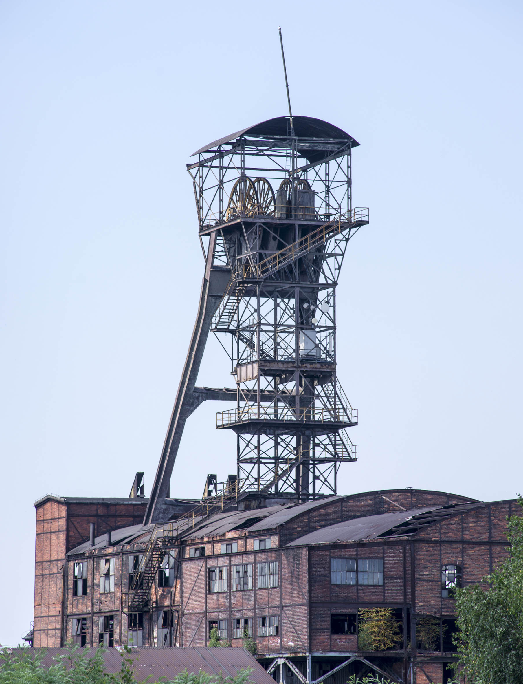 Schacht Tadeusz, ehemalige Steinkohlenzeche Ludwigsglück-Concordia in Zabrze, Polen